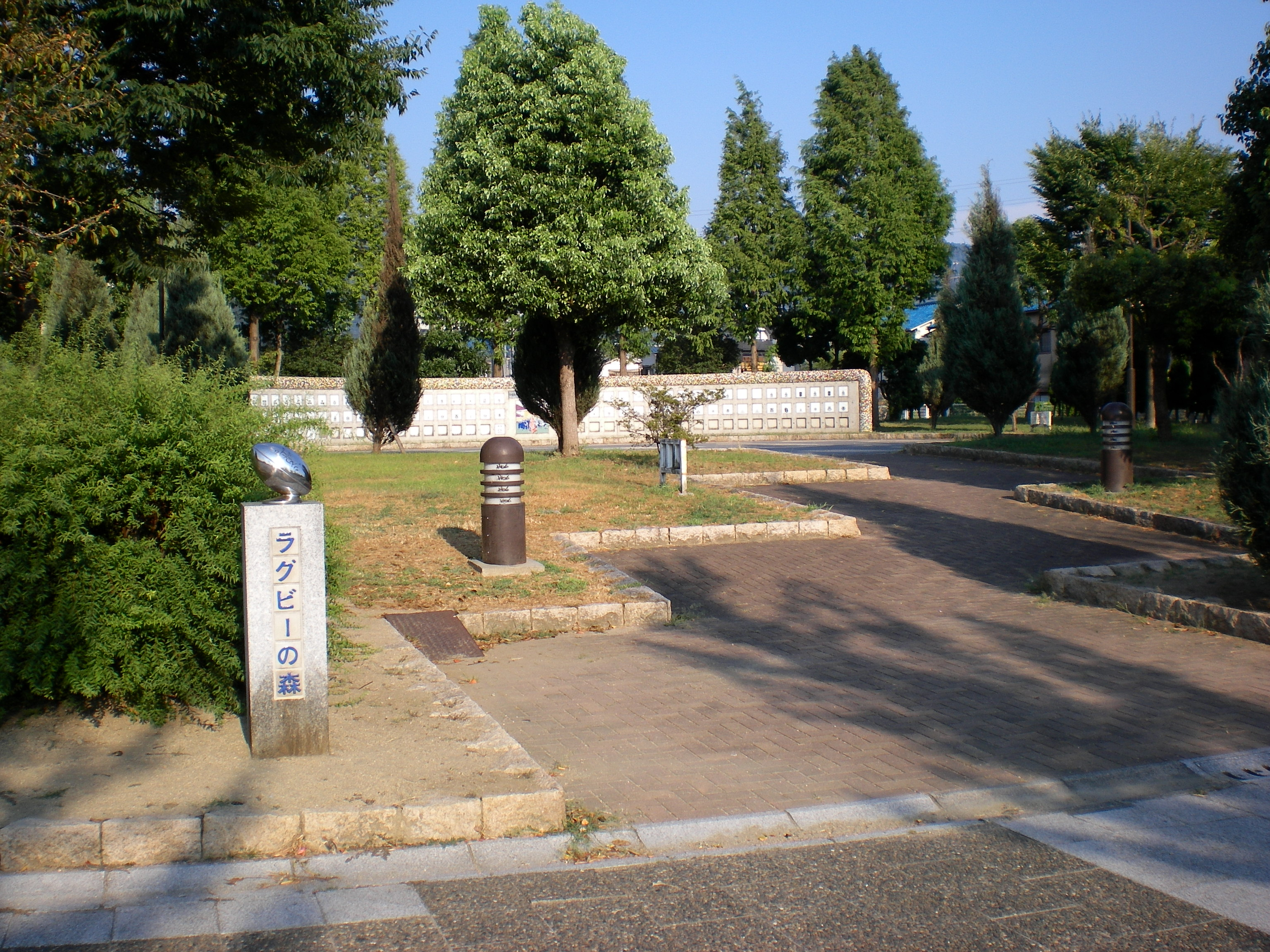 花園中央公園内、近鉄花園ラグビー場第3グラウンド横にあるモニュメント。銘板には、全国高等学校ラグビーフットボール大会優勝校の名が刻まれている。